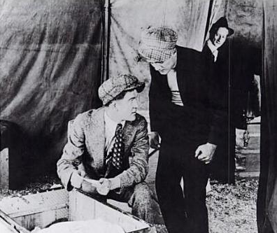 Imagen del serial cinematográfico dirigido por Francis Ford The Adventures of Peg o' the Ring (1916) en la que se ve a su hermano Jack Ford a la izquierda.